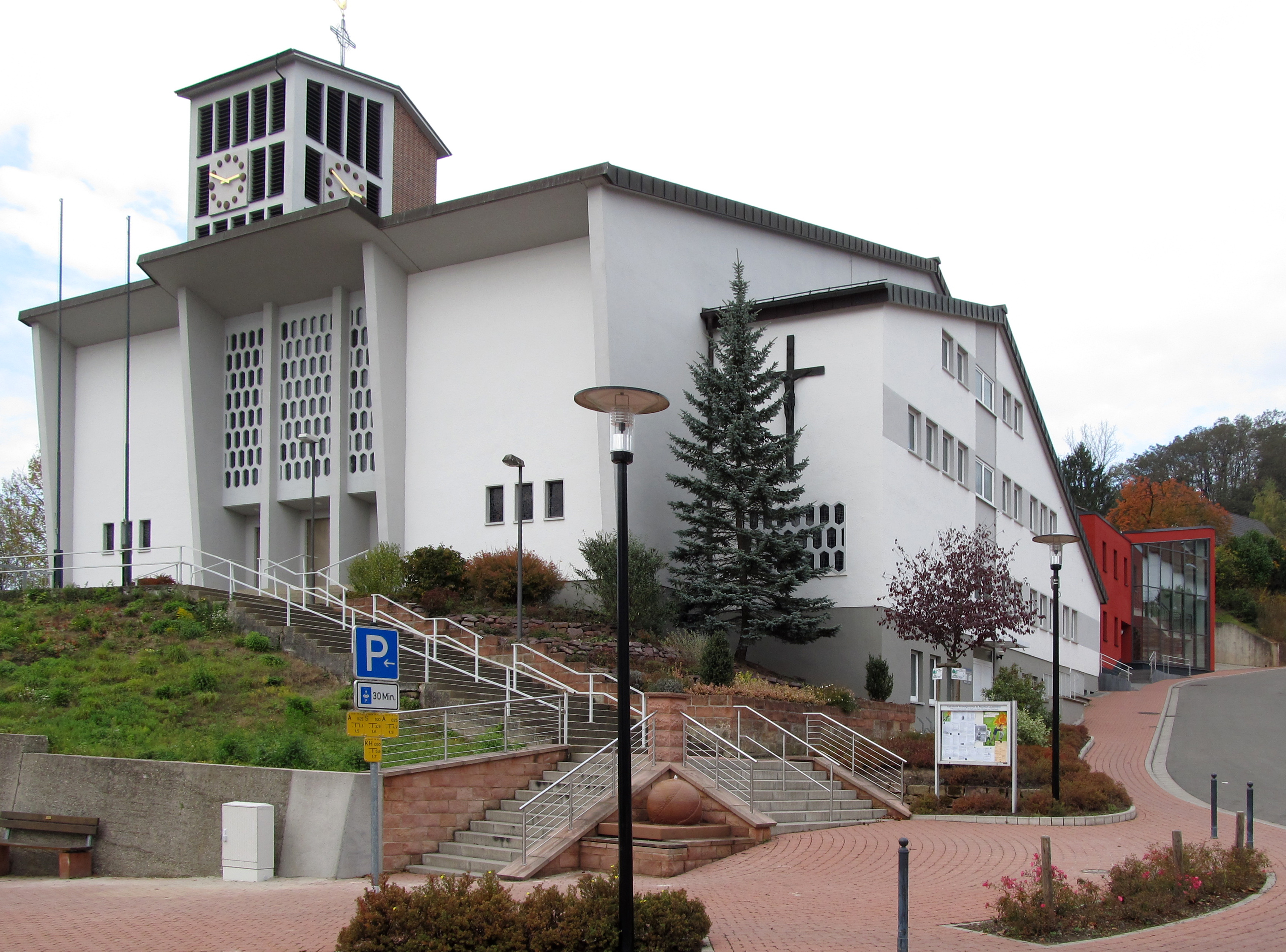 Kirche St. Mauritius im Ortskern von Blieskastel-Lautzkirchen